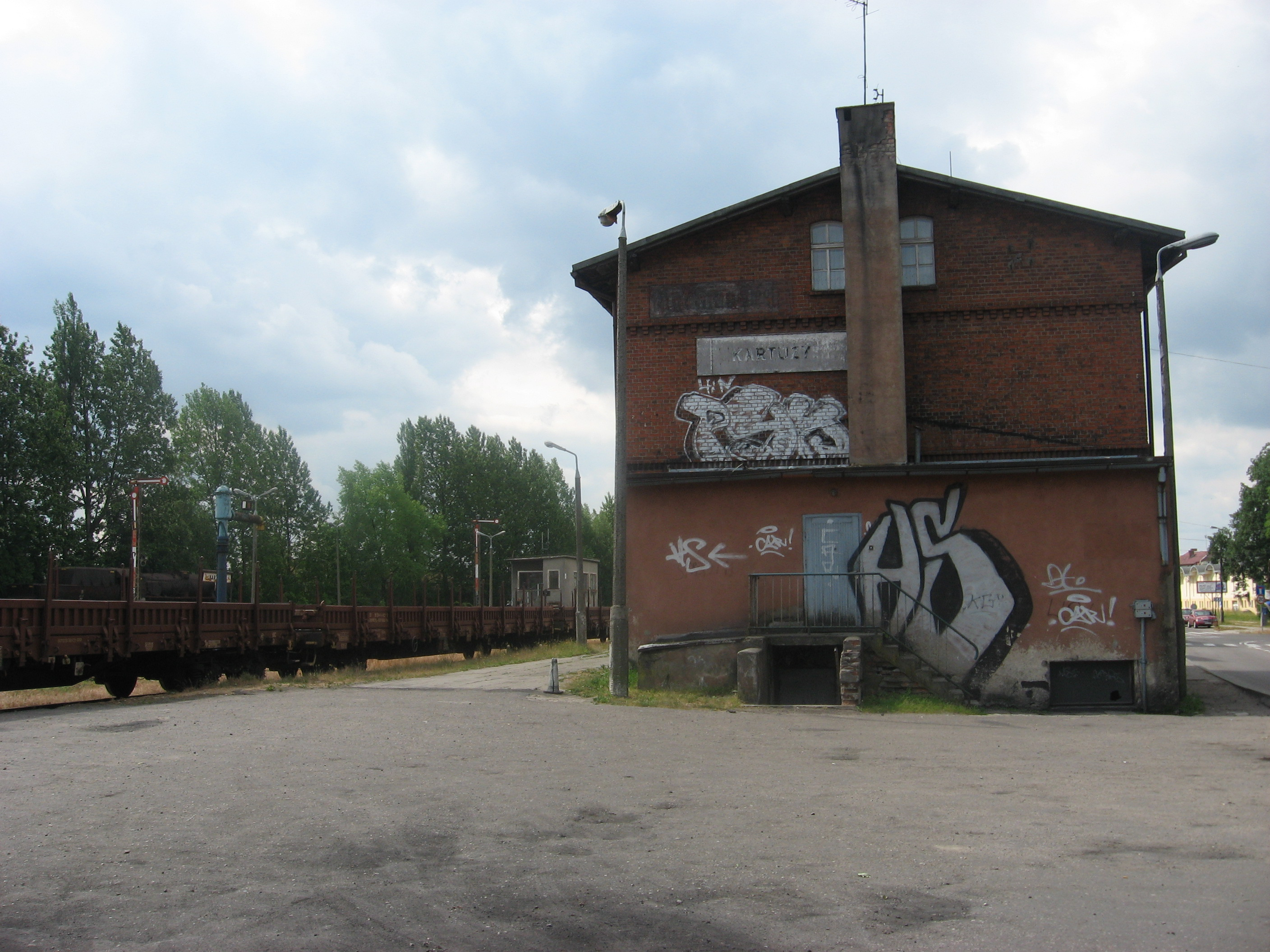 Stacja kolejowa Kartuzy (woj. pomorskie)